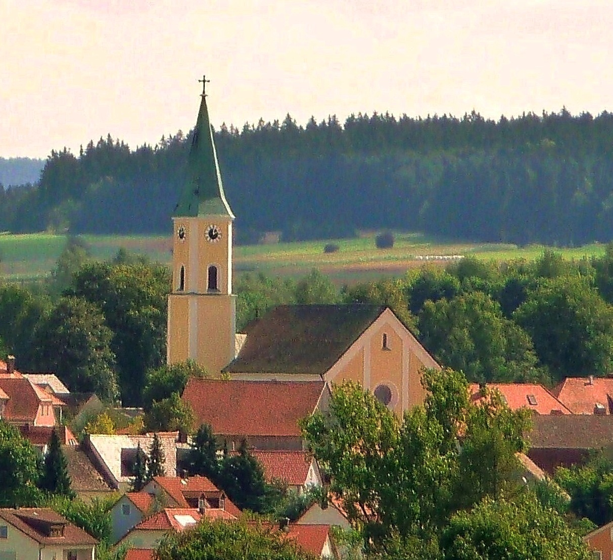 Moosbach, kath. Kirche St. Peter und Paul